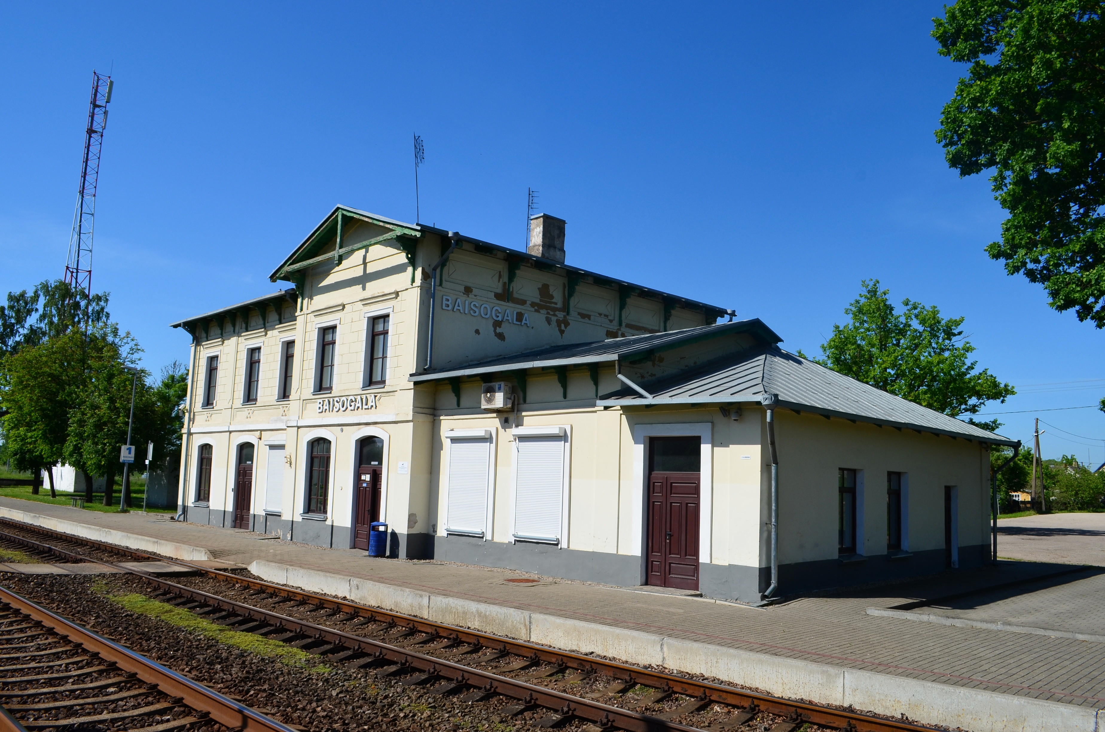 Baisogalos geležinkelio stotis, Radviliškio raj.